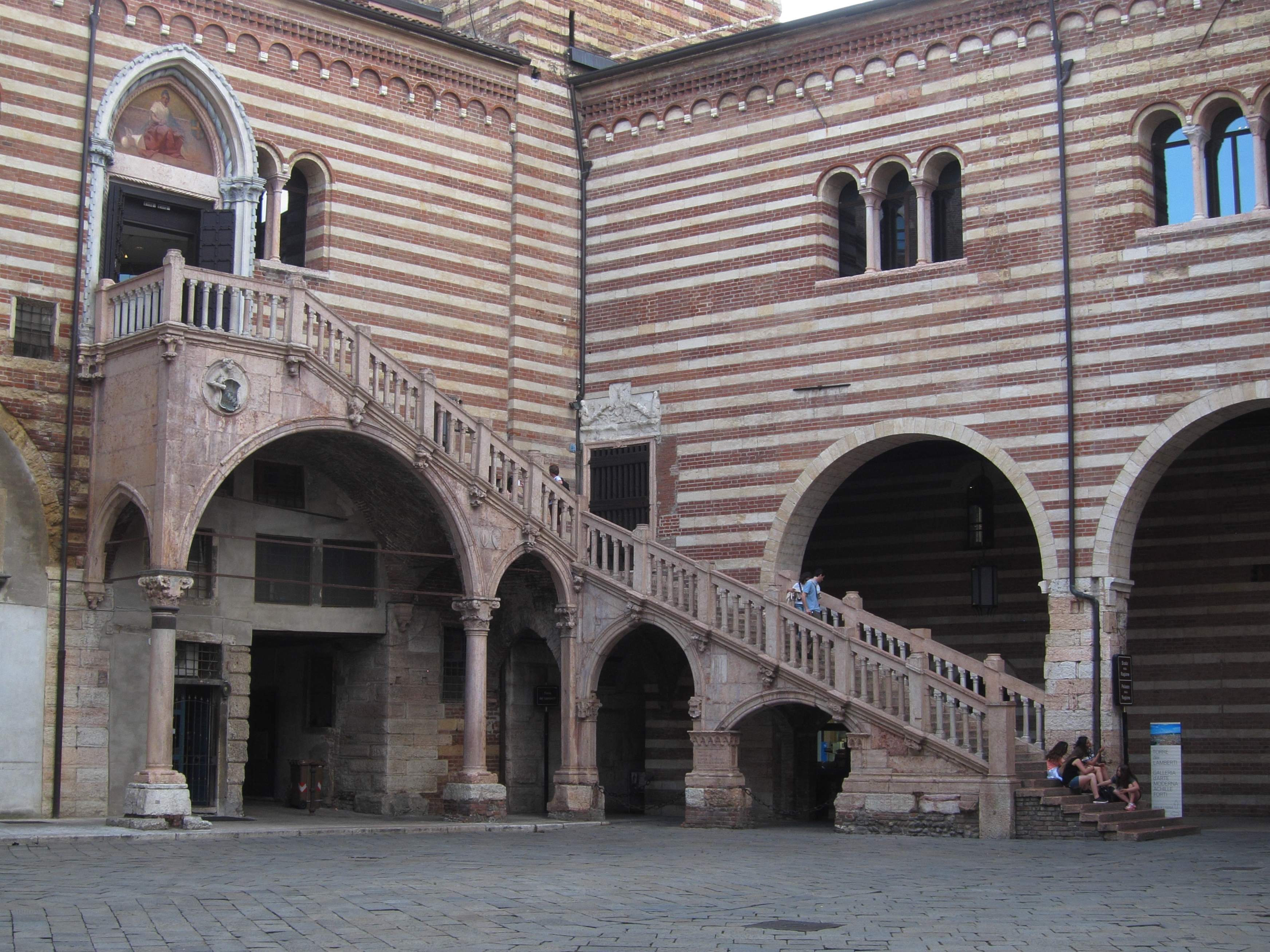 Scala della Ragione am Palazzo della Ragione (Palazzo del Comune), Verona